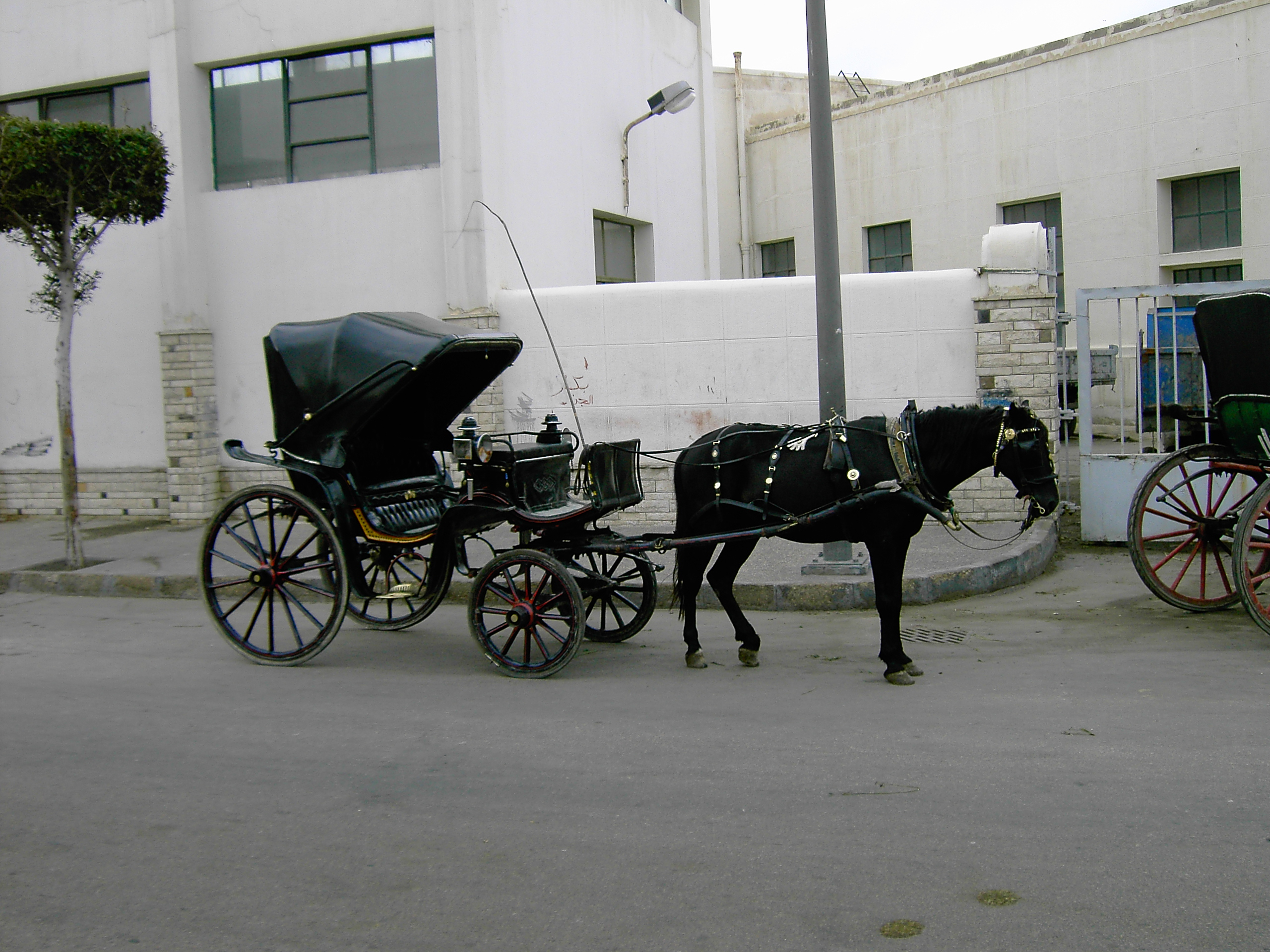 photo personnelle